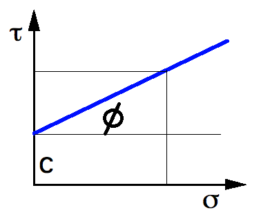 모어-쿨롱 파괴 규준